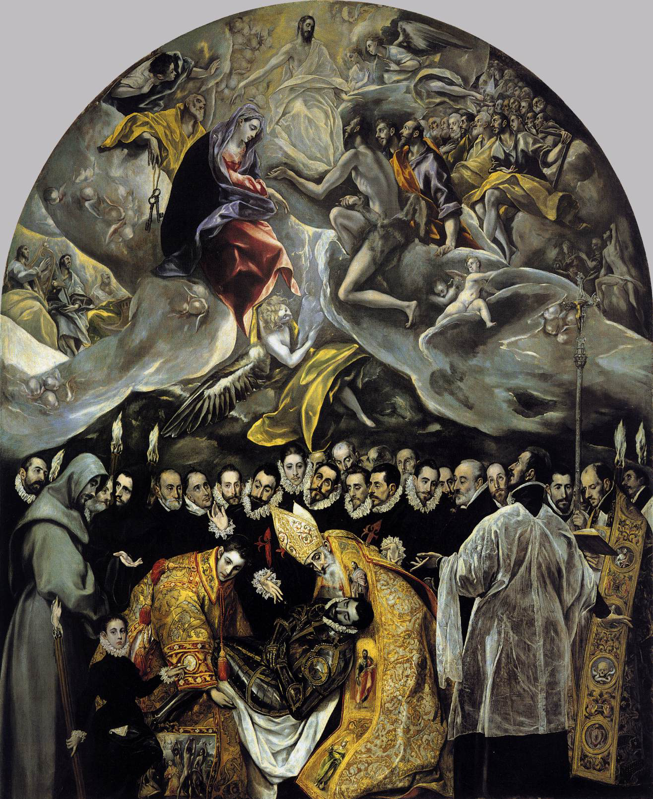 El entierro del señor de Orgaz, más conocido como El entierro del conde de Orgaz, es un óleo sobre lienzo pintado en estilo manierista por El Greco entre los años 1586 y 1588. Fue realizado para la iglesia de Santo Tomé de Toledo, (España), donde aun permanece, y es considerada una de las las mejores obras de su autor. El cuadro representa el milagro en el que, según la tradición, San Esteban y San Agustín de Hipona bajaron del Cielo para enterrar personalmente a Gonzalo Ruiz de Toledo, señor de la villa de Orgaz y fallecido en 1323, en la iglesia de Santo Tomé, como premio por su vida ejemplar de devoción, humildad y obras de caridad. El Greco aceptó el encargo de realizar la obra en 1586, algo más de dos siglos y medio después de los hechos que en ella representó.